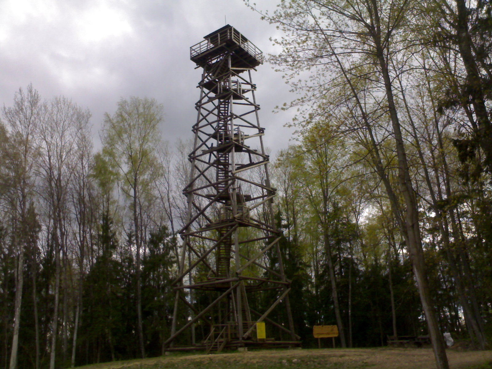 Eglukolna vierinturns